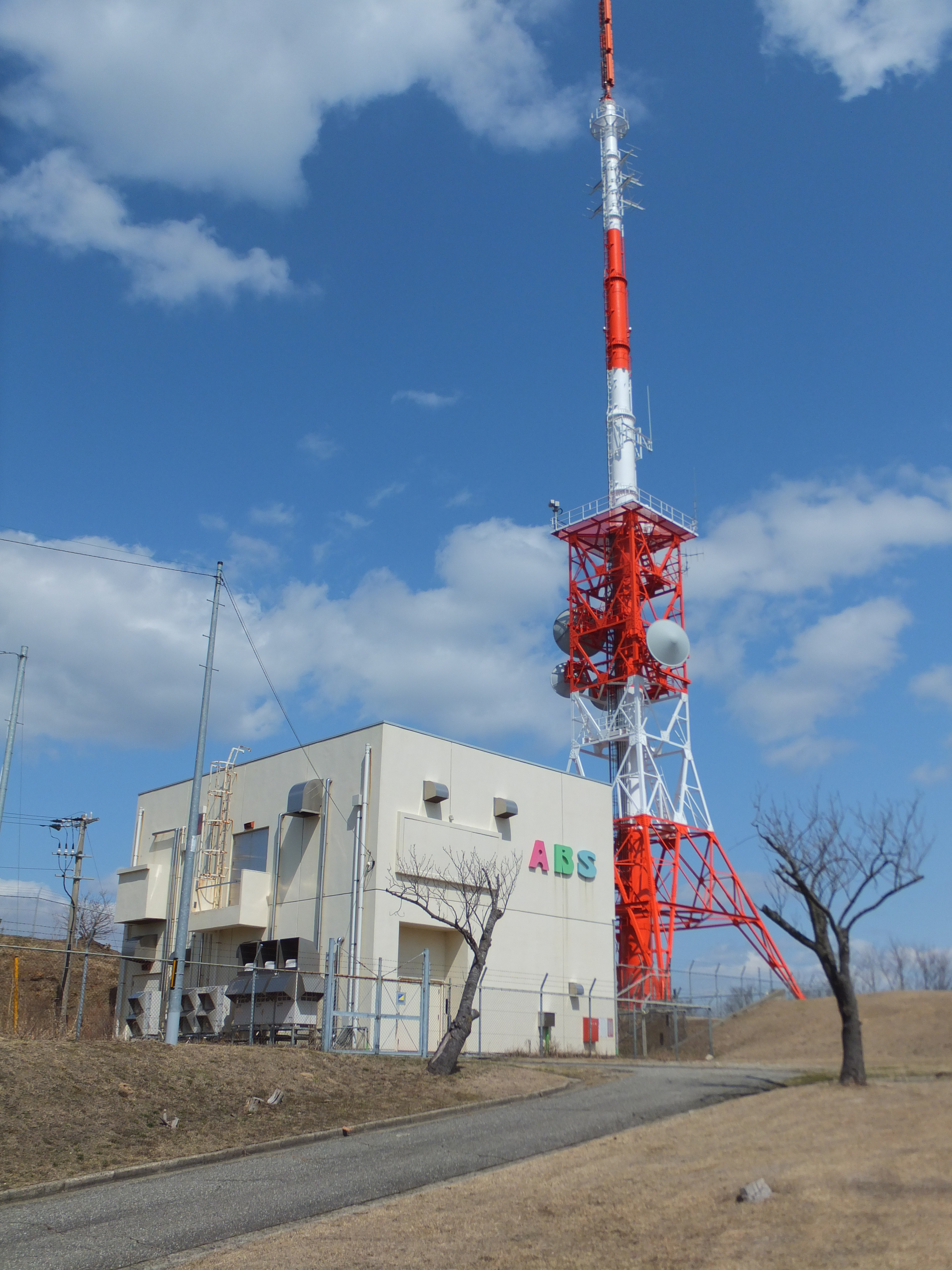 秋田放送大森山テレビ送信所